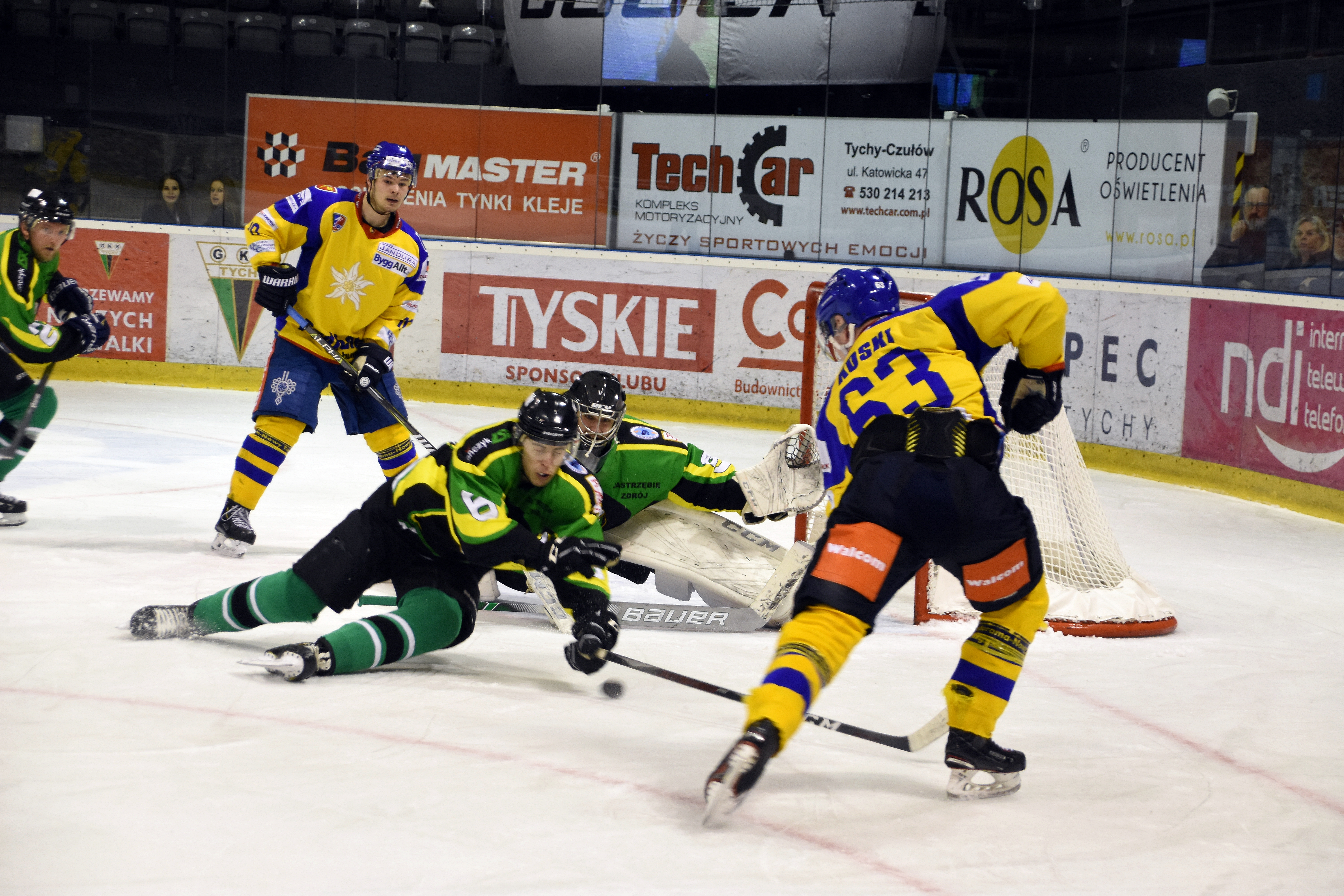 PP JKH Jastrzębie - Podhale Nowy Targ